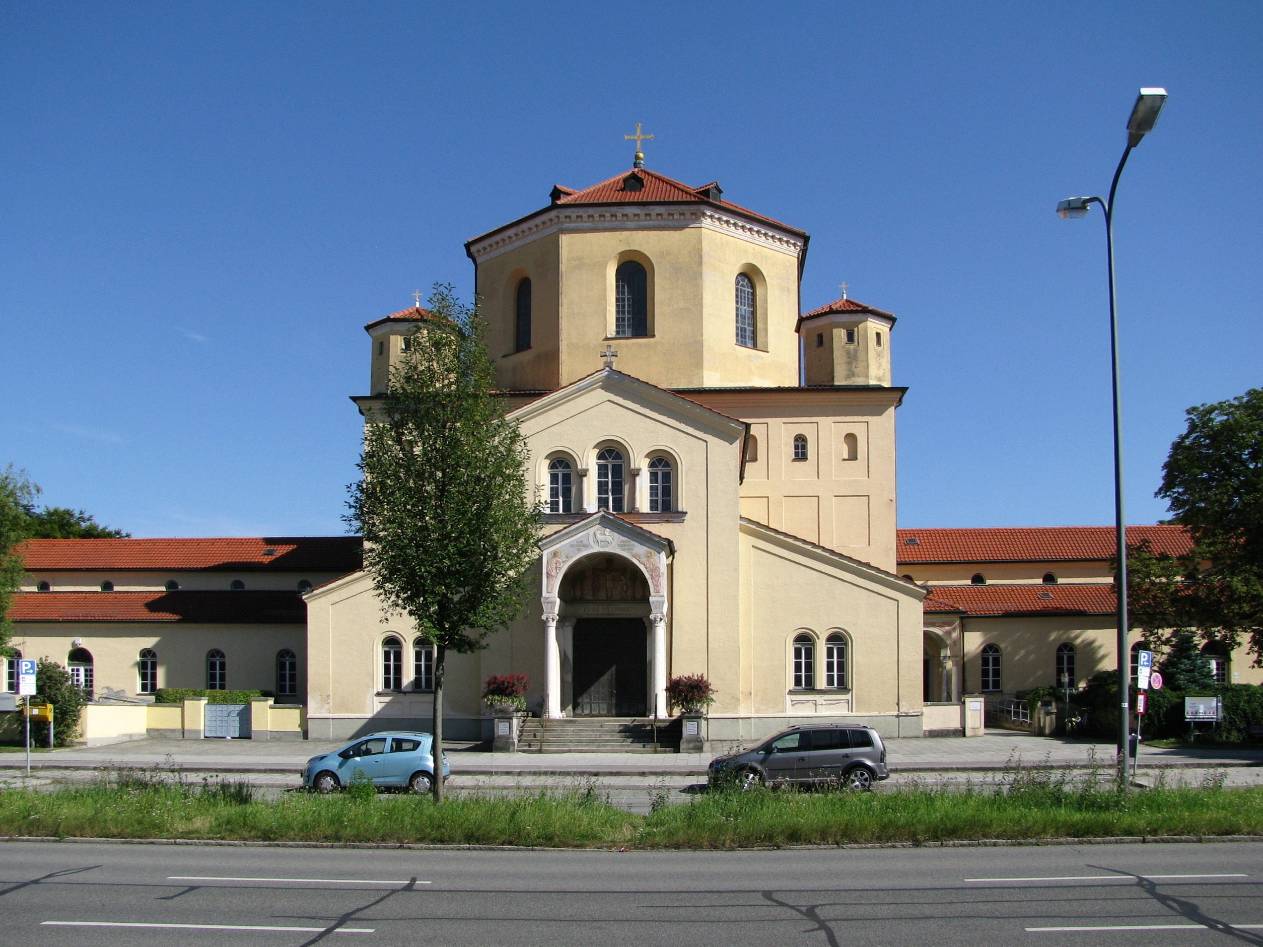 Nordfriedhof München; Aussegnungshalle an der Ungererstraße, Straßenseite (Westen)